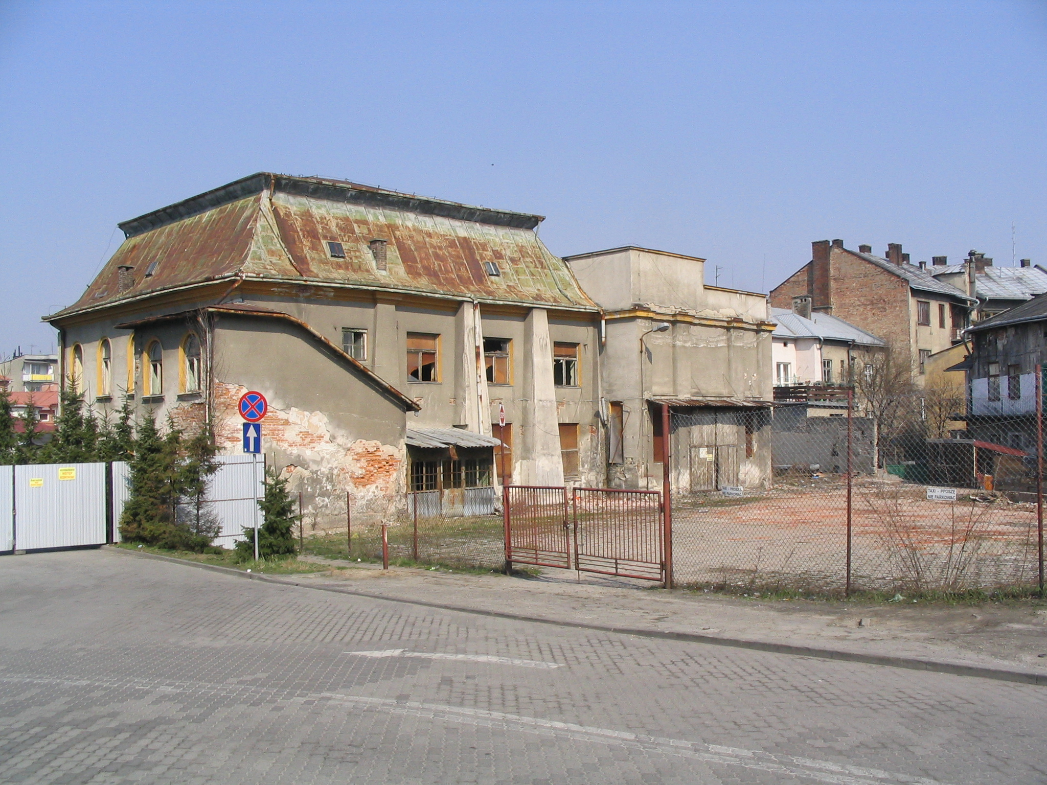 The Zasanie Synagogue, Przemyśl